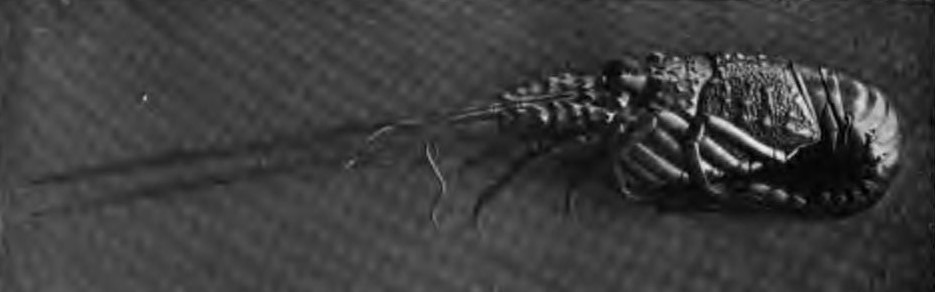 海老の小尻